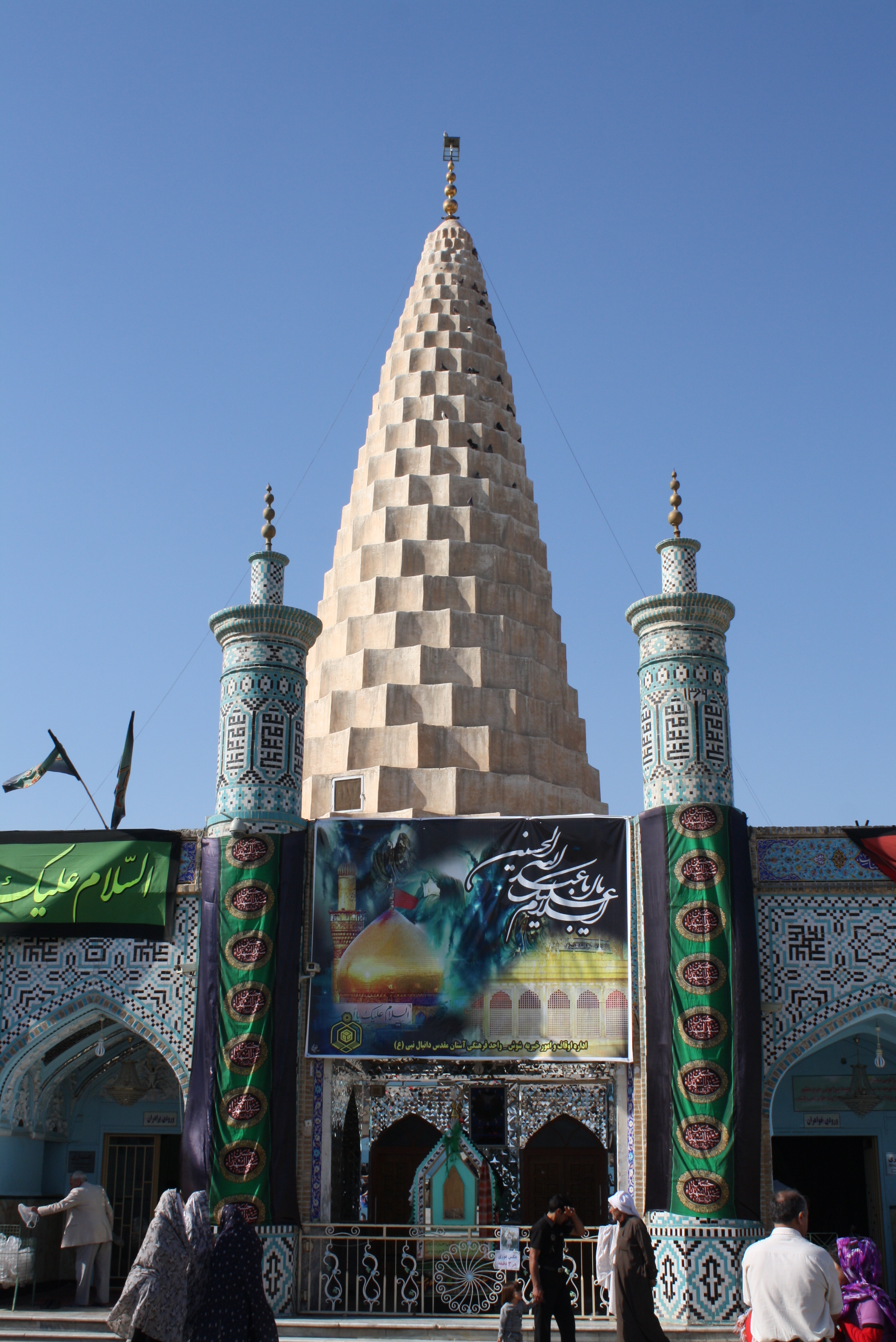 Сузы (Иран). Гробница пророка Даниила. Вид со двора.